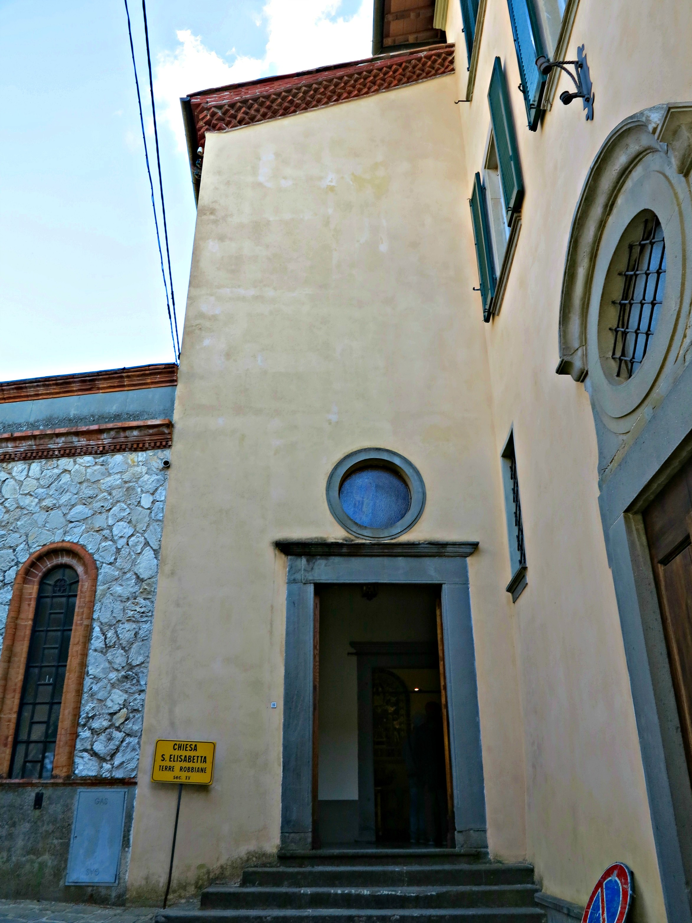 Esterno della Chiesa di Sant'Elisabetta, Barga